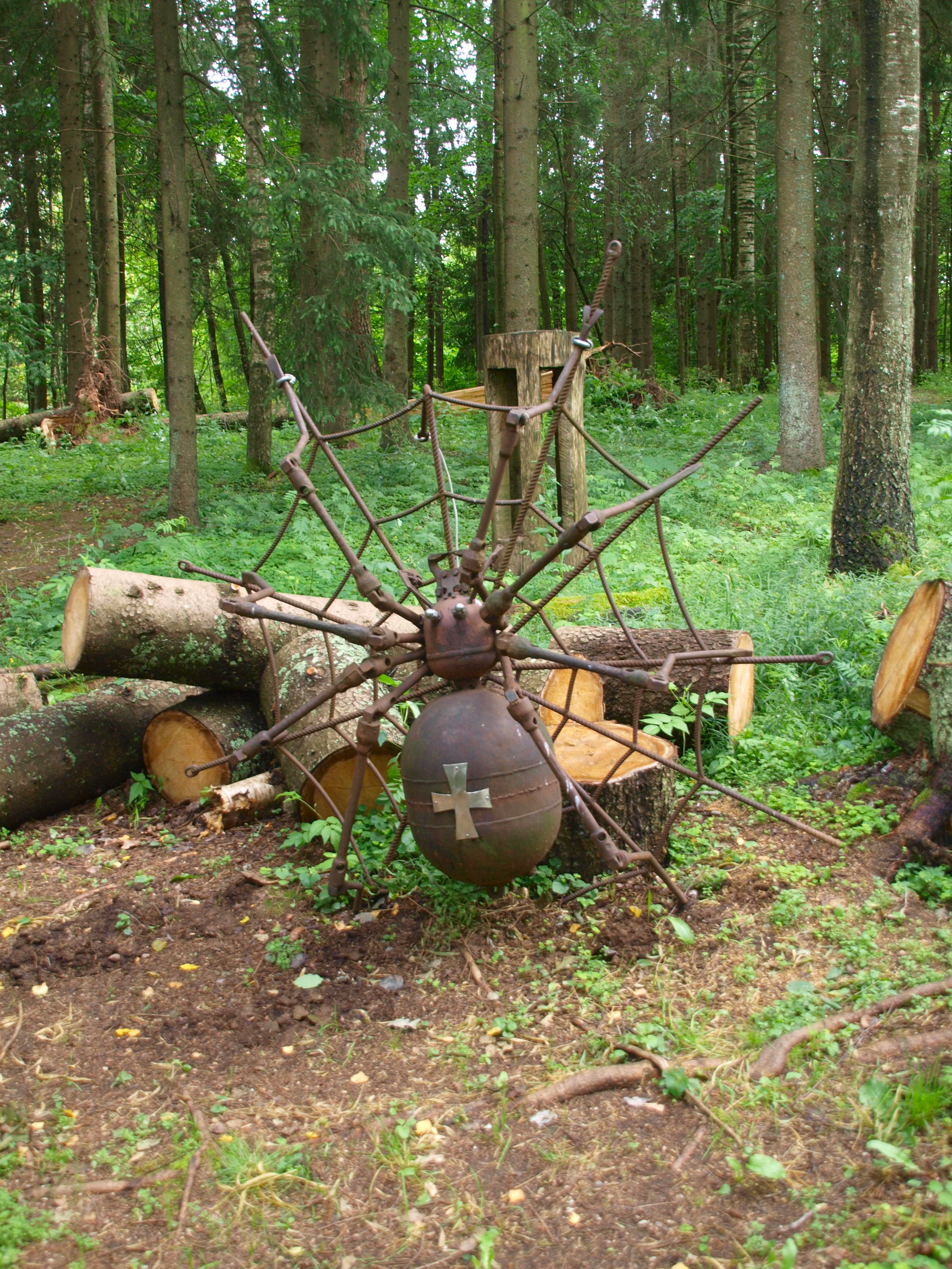 Spinnenskulptur im Vienkoču Park, Lettland